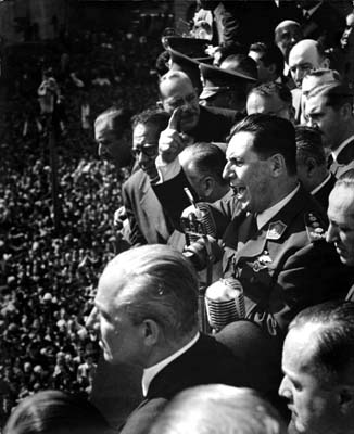 Perón dando un discurso